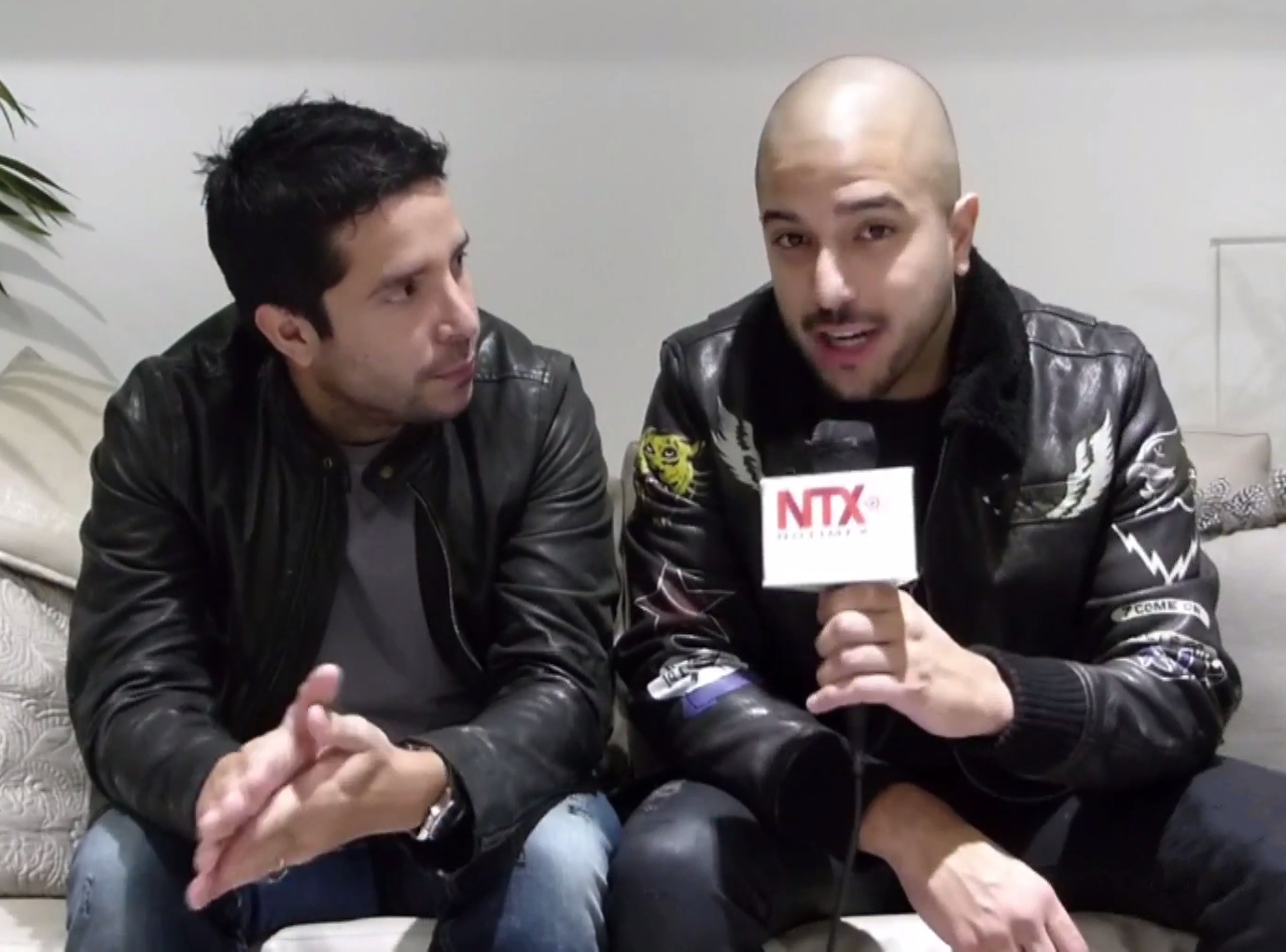 Cali y el Dandee ofrecerán concierto en la Ciudad de México el próximo 17 de junio